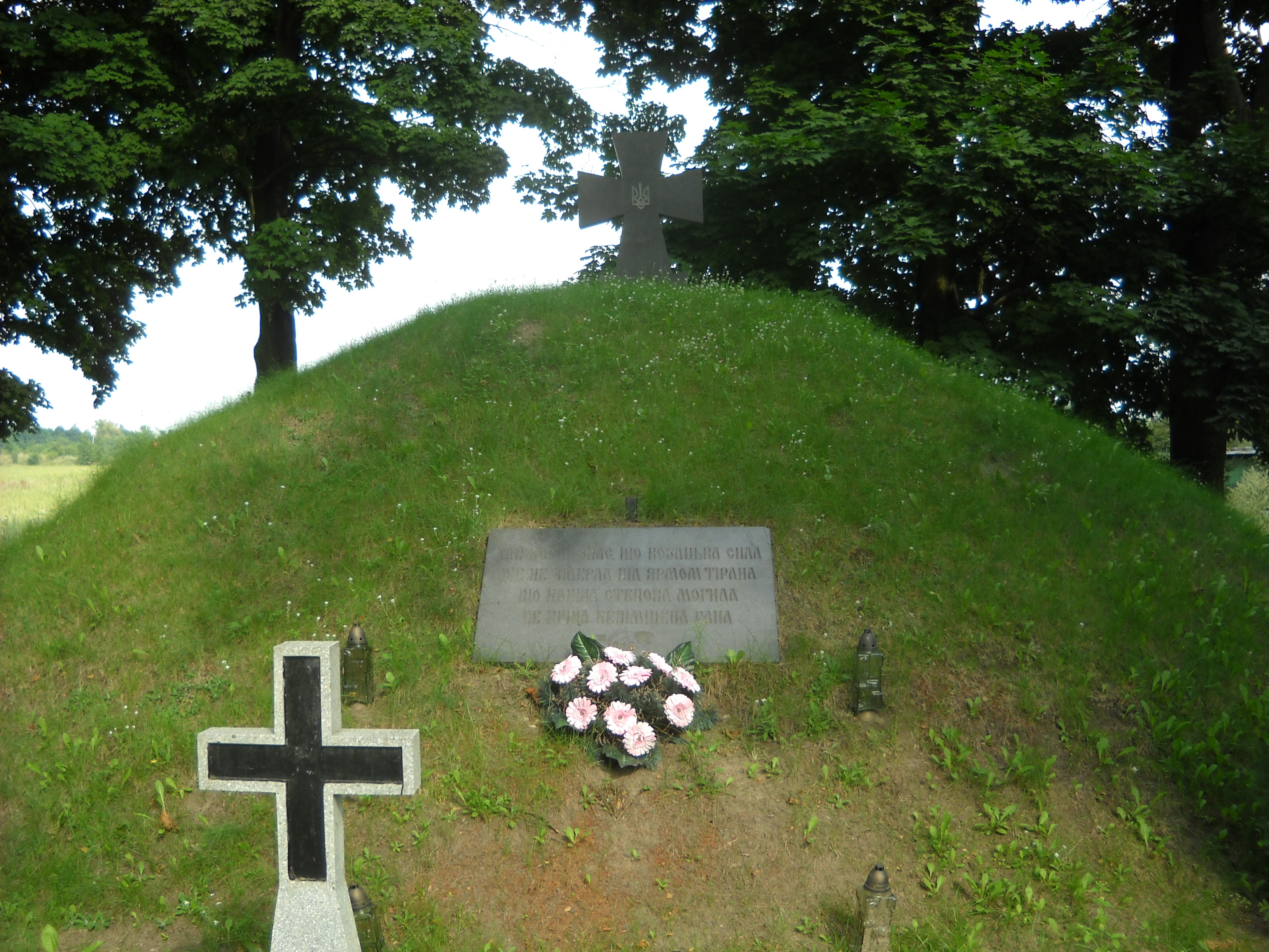 Kurhan na cmentarzu ukraińskich internowanych wojskowych w Aleksandrowie Kujawskim